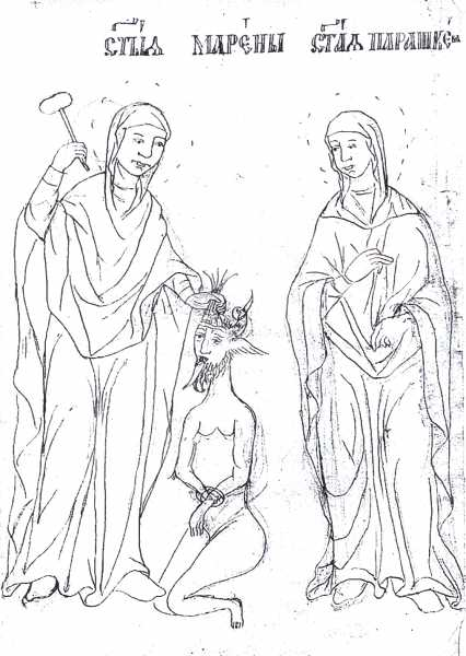 Рисунка на Света Марина и Света Параскева от Михалко Голев